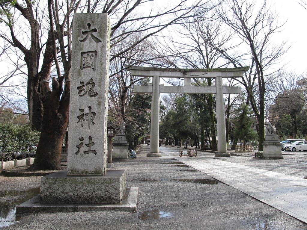 大國魂神社大鳥居と社号標